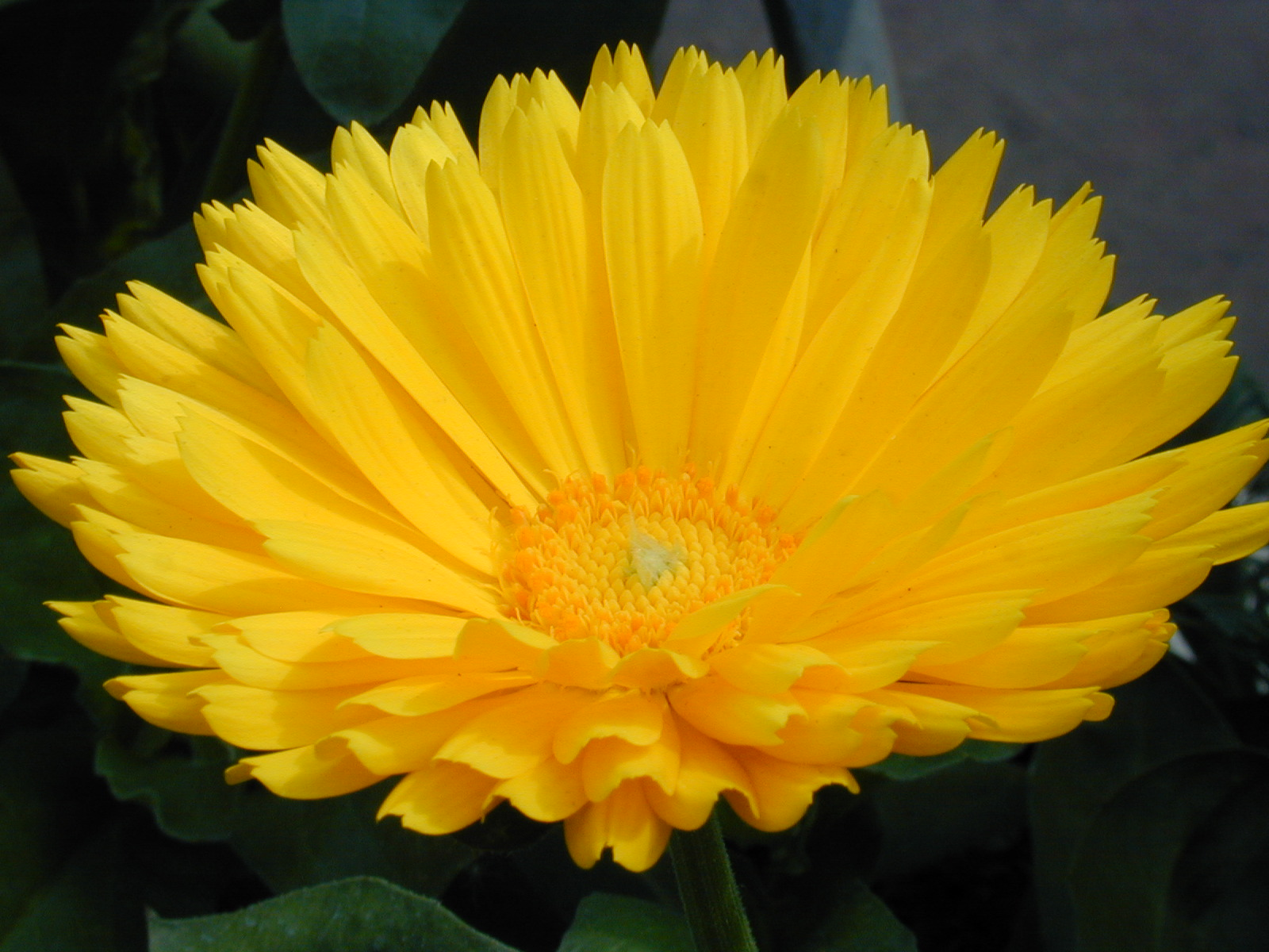 Calendula officinalis